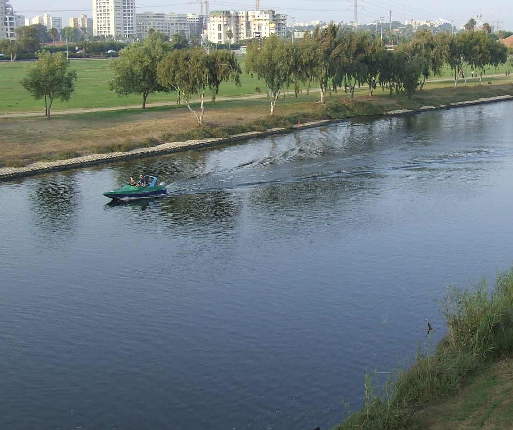 נחל הירקון נשקף מצפונו של רחוב אבן גבירול